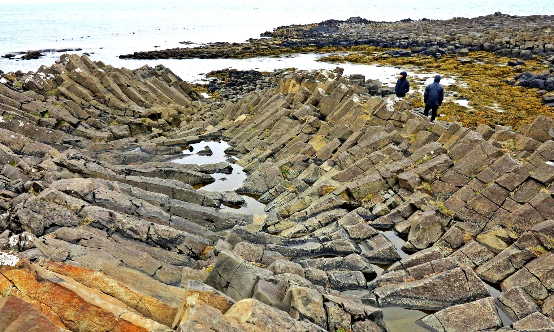 Kalfhamarsvik, Iceland